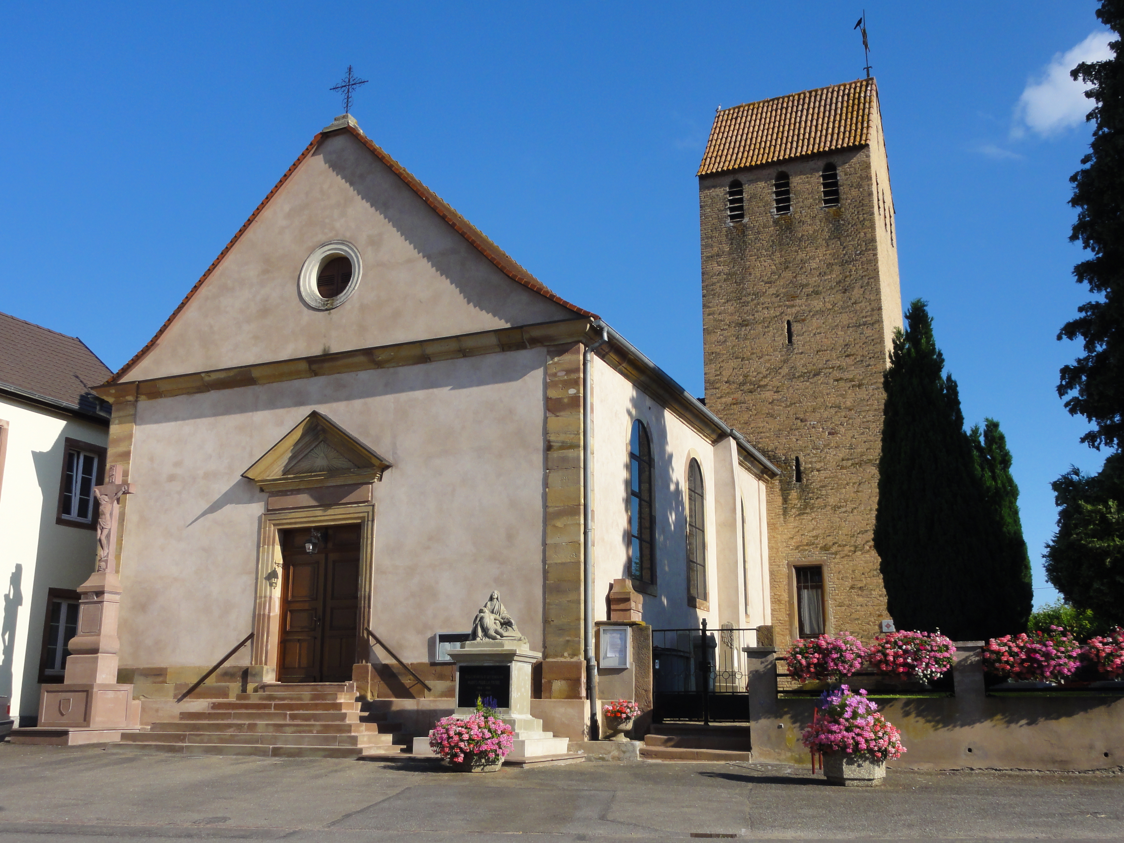 Alsace, Bas-Rhin, Offenheim, Église Saint-Arbogast (PA00085199, IA67000977): Vue du clocher, toit en bâtière, de style roman et de la façade avec le portail néo-classique.